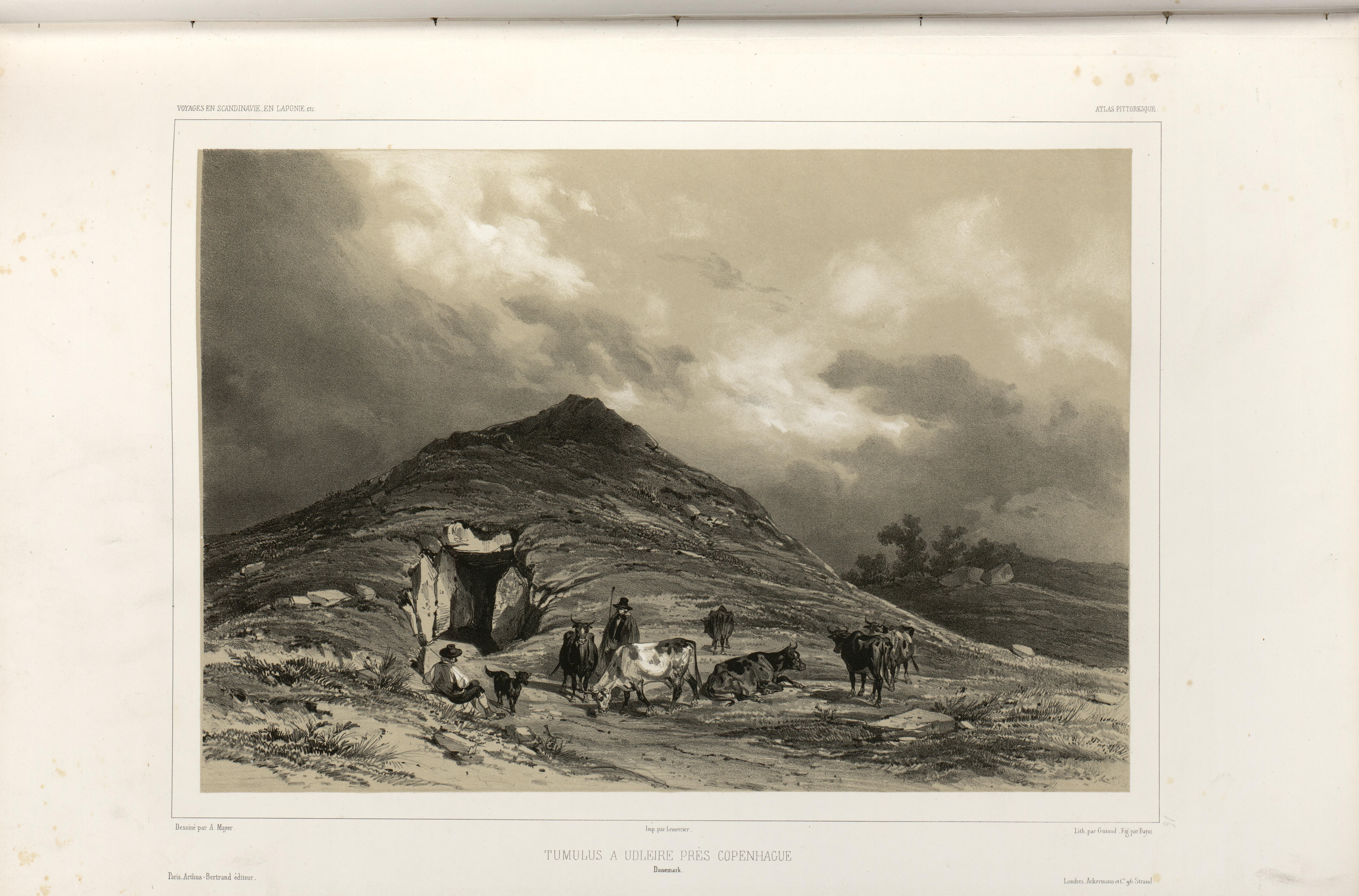 Illustrasjon hentet fra boken "Voyages de la Commission scientifique du Nord, en Scandinavie, en Laponie, au Spitzberg et aux Feröe" av ukjent forfatter og utgitt av Arthus BertrandParis : Arthus Bertrand, [1852] (Paris, [1852])